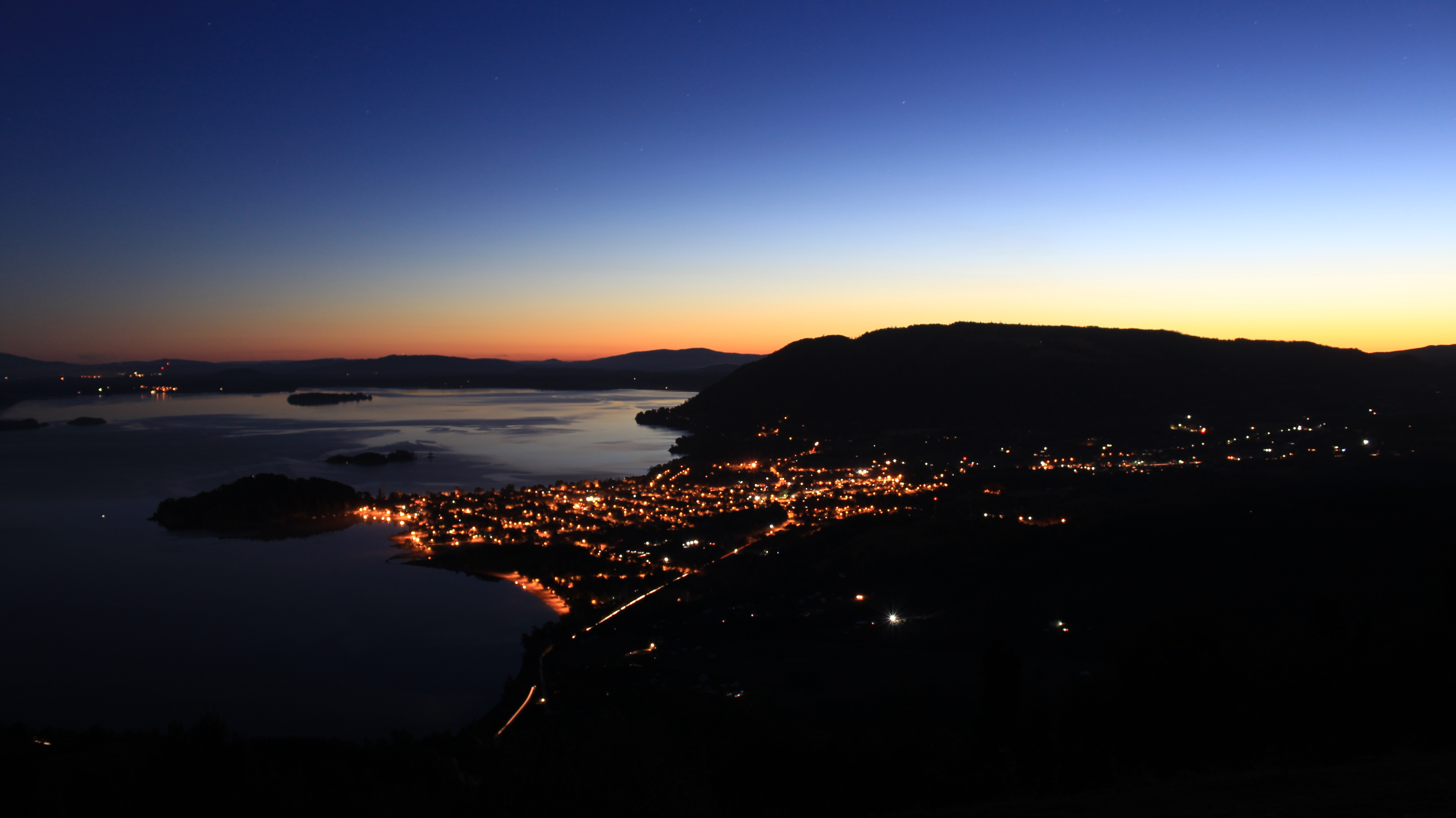 Vista aerea de Lican Ray, al atardecer.